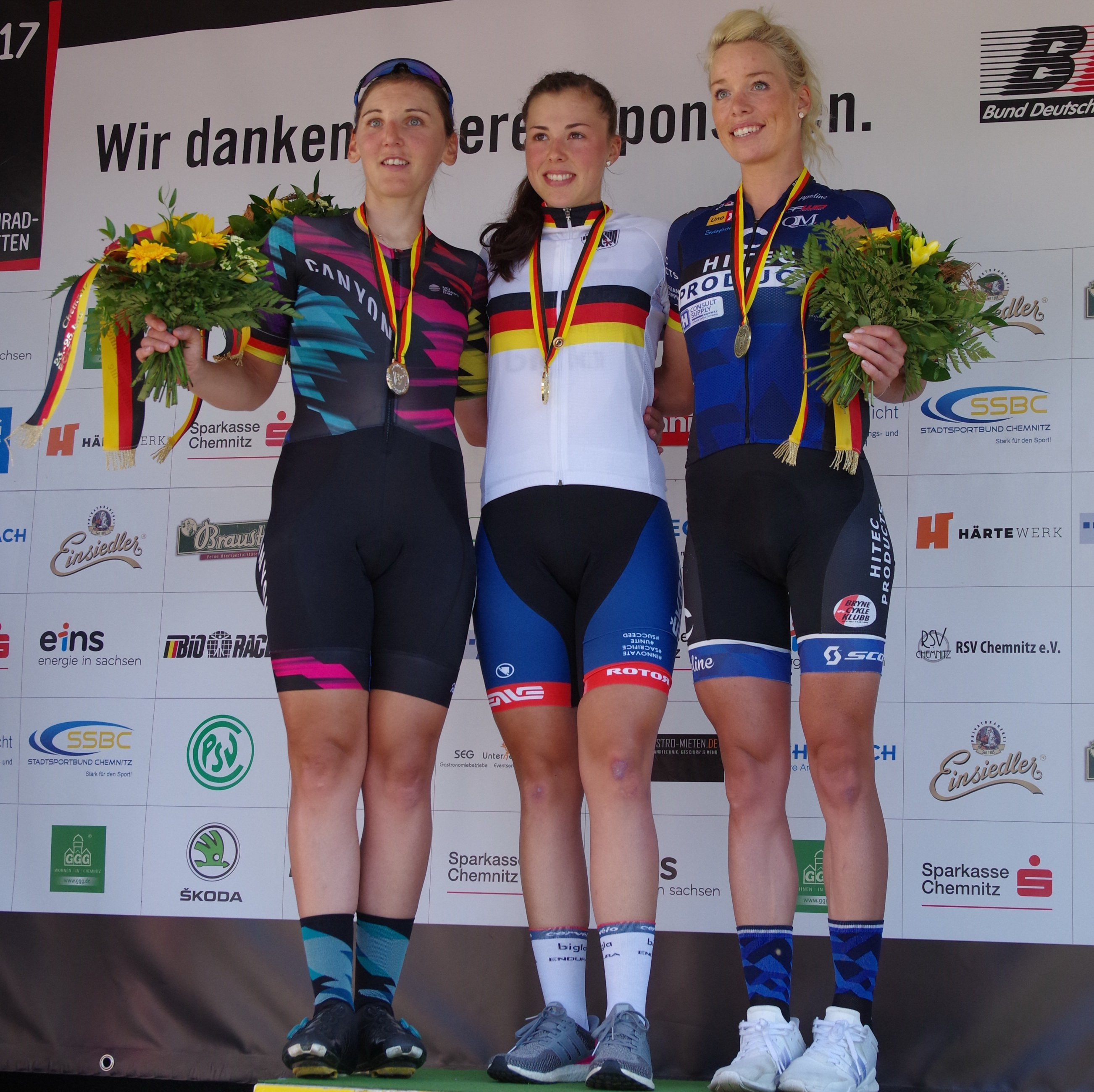 Deutsche Meisterschaften im Straßenrennen 2017 (Frauen) 24. Juni 2017 Siegerehrung Platz 1: Lisa Klein Platz 2: Lisa Brennauer Platz 3: Charlotte Becker The making of this document was supported by the Community-Budget of Wikimedia Germany.